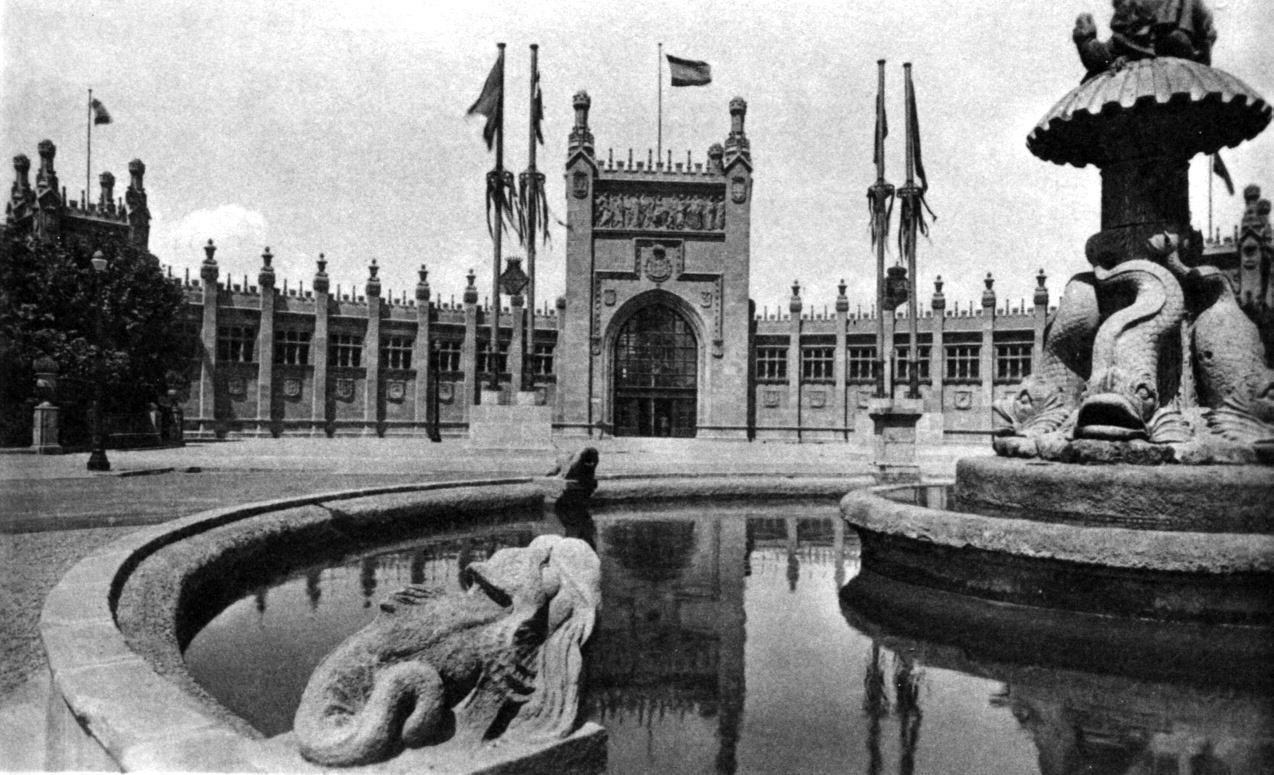 Pabellón de las Diputaciones de la Exposición Internacional de Barcelona de 1929, de Enric Sagnier